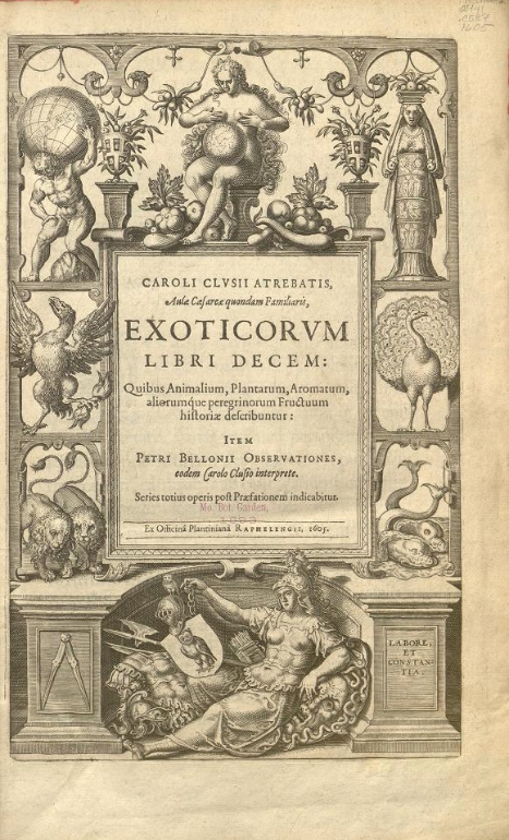 Carolus Clusius, Exoticorum libri decem, title page